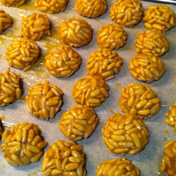 Panellets.